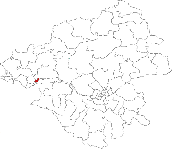 Carte de localisation du canton de Saint-Nazaire-est (France, Loire-Atlantique)